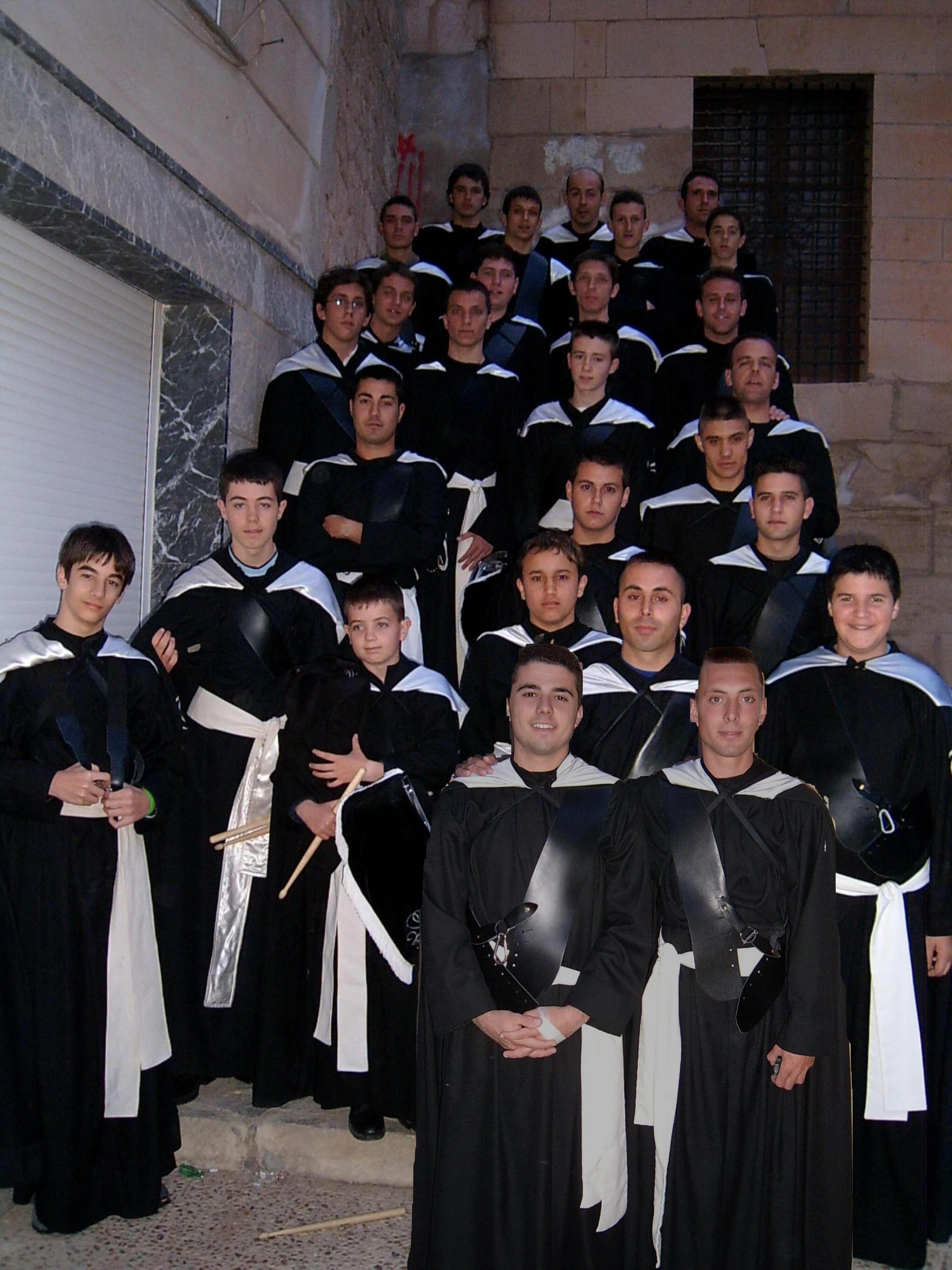 Banda de tambores Cofradía de la Soledad de Monóvar